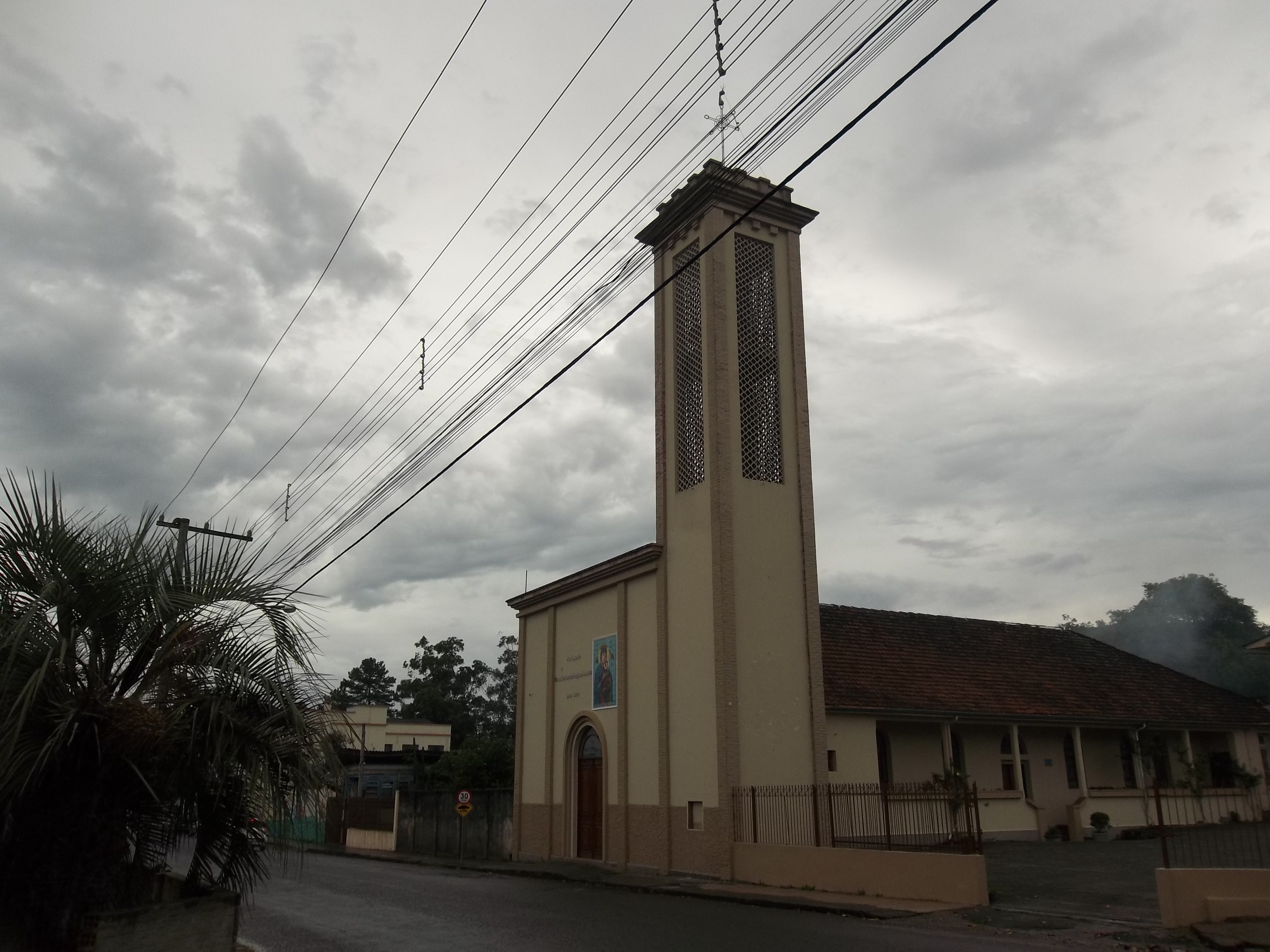 Igreja NS Perpétuo Socorro, Nossa Senhora do Perpétuo Socorro, Sede, Santa Maria, Rio Grande do Sul, Brasil.